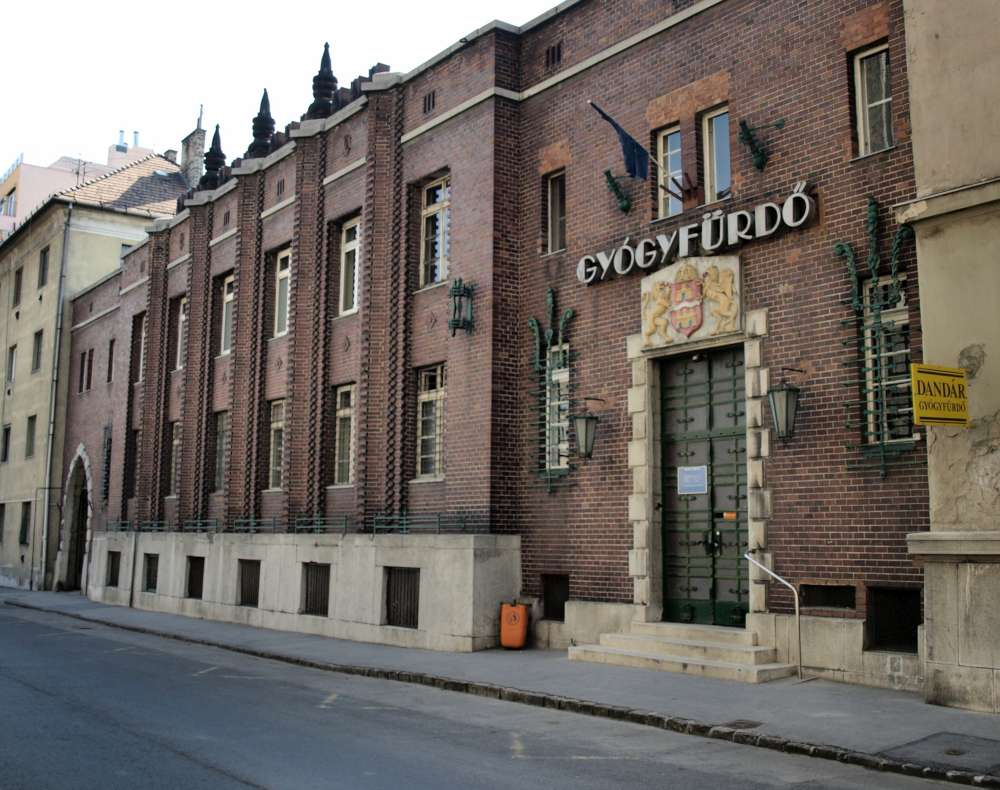 Dandár utcai gyógyfürdő épülete (Budapest, IX. ker., Dandár utca)